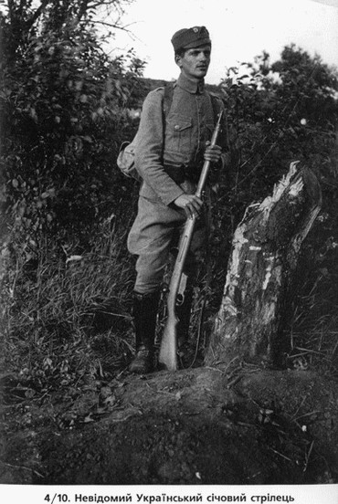 украинский сечевой стрелец с головном уборе - мазепинка